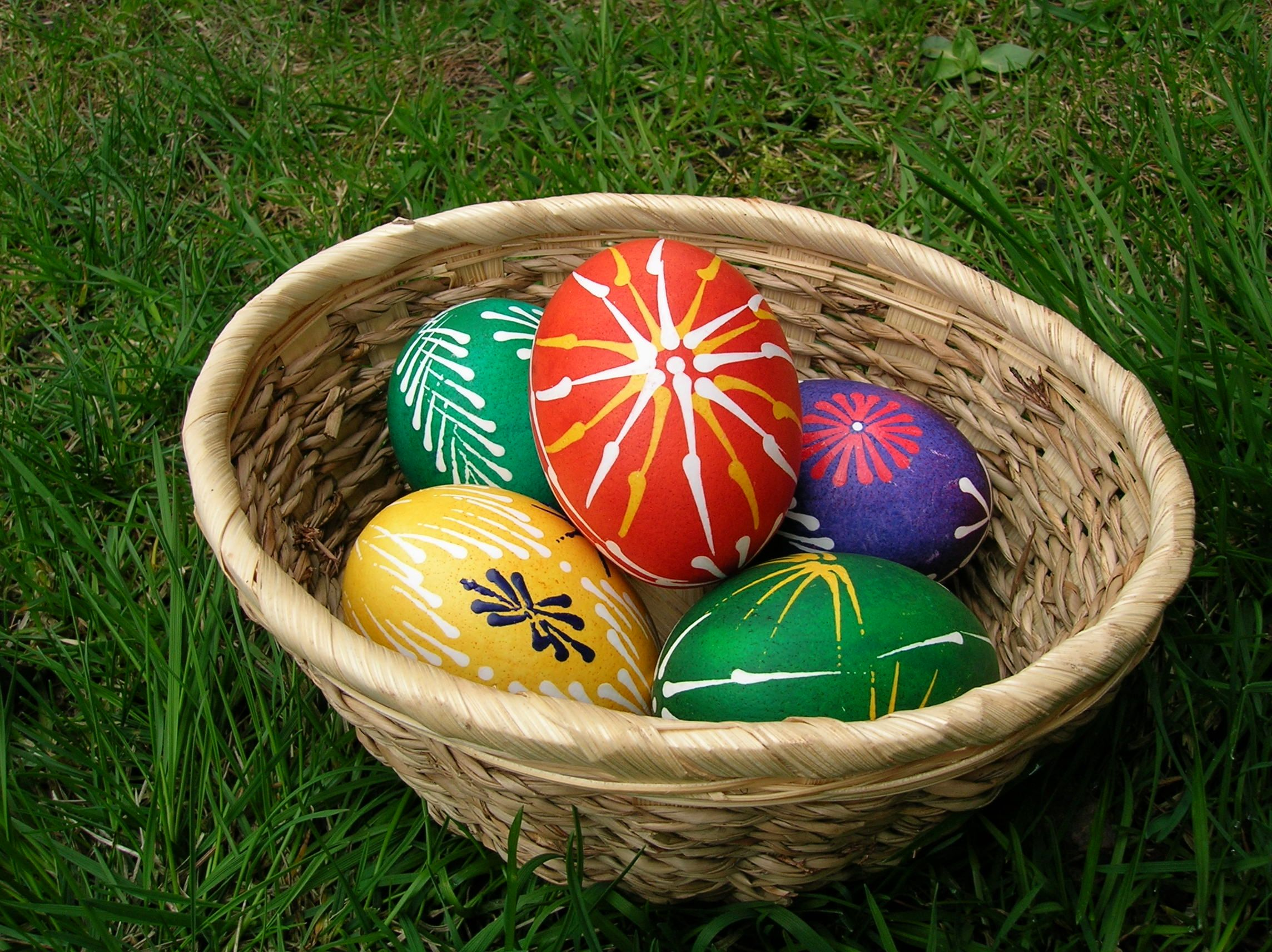 Easter eggs